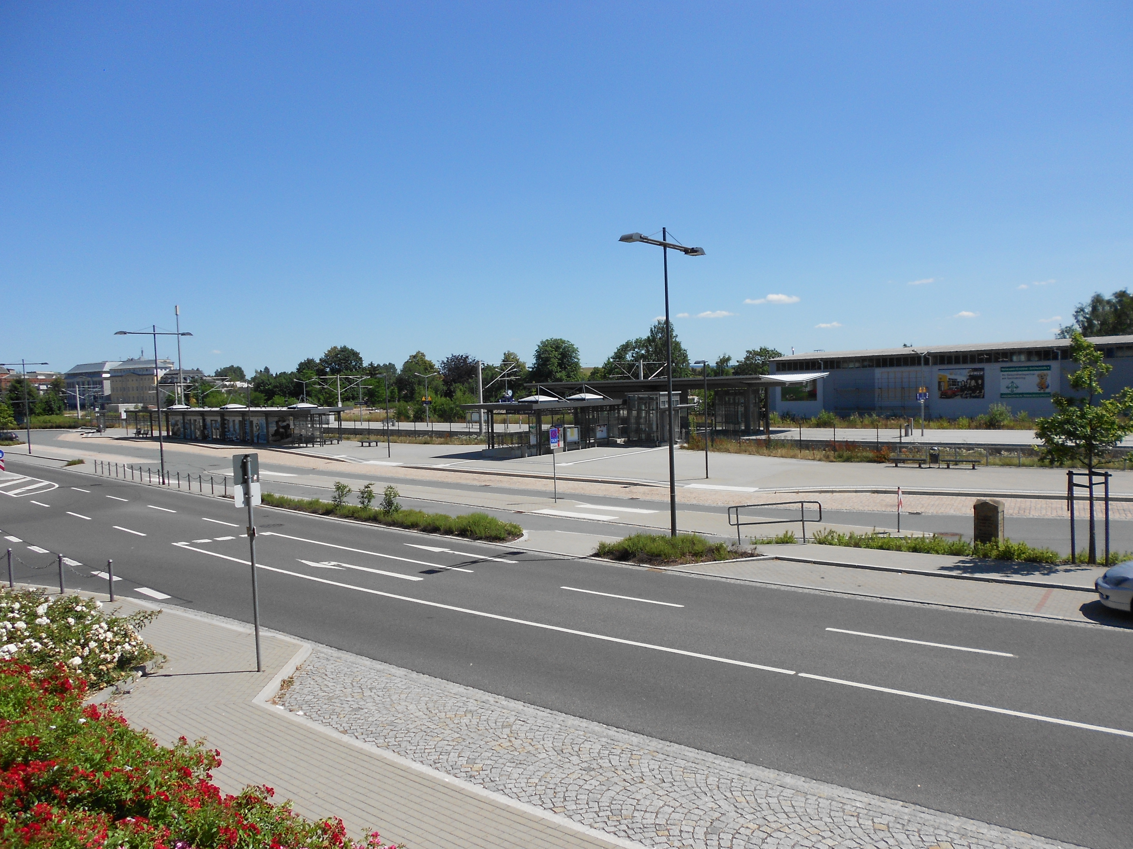 ÖPNV-SPNV Verknüpfungsstelle in Hohenstein-Ernstthal im Juli 2013